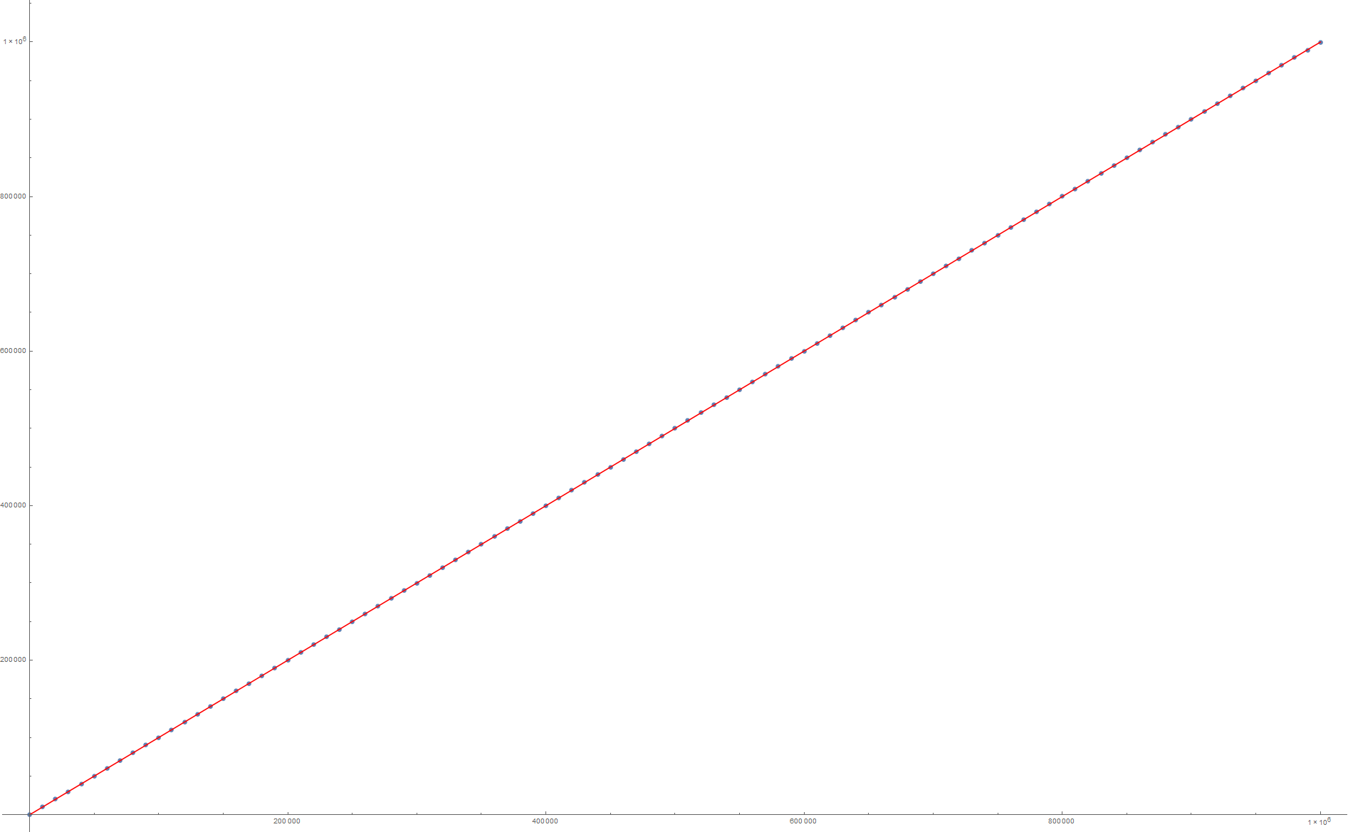 第二切比雪夫函数与y=x的对比